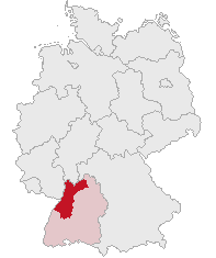 Regierungsbezirk Karlsruhe, Baden-Württemberg, Germany